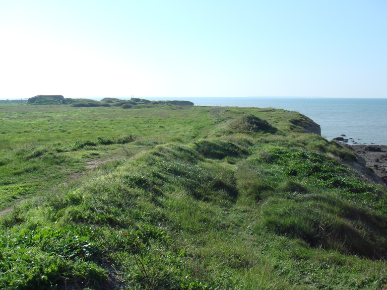 La Pointe du Chay, France.